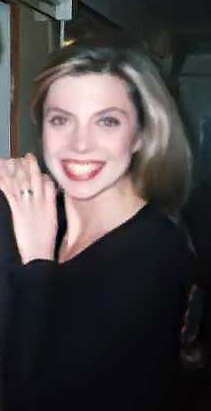 Benedicta Boccoli al Teatro San babila di Milano